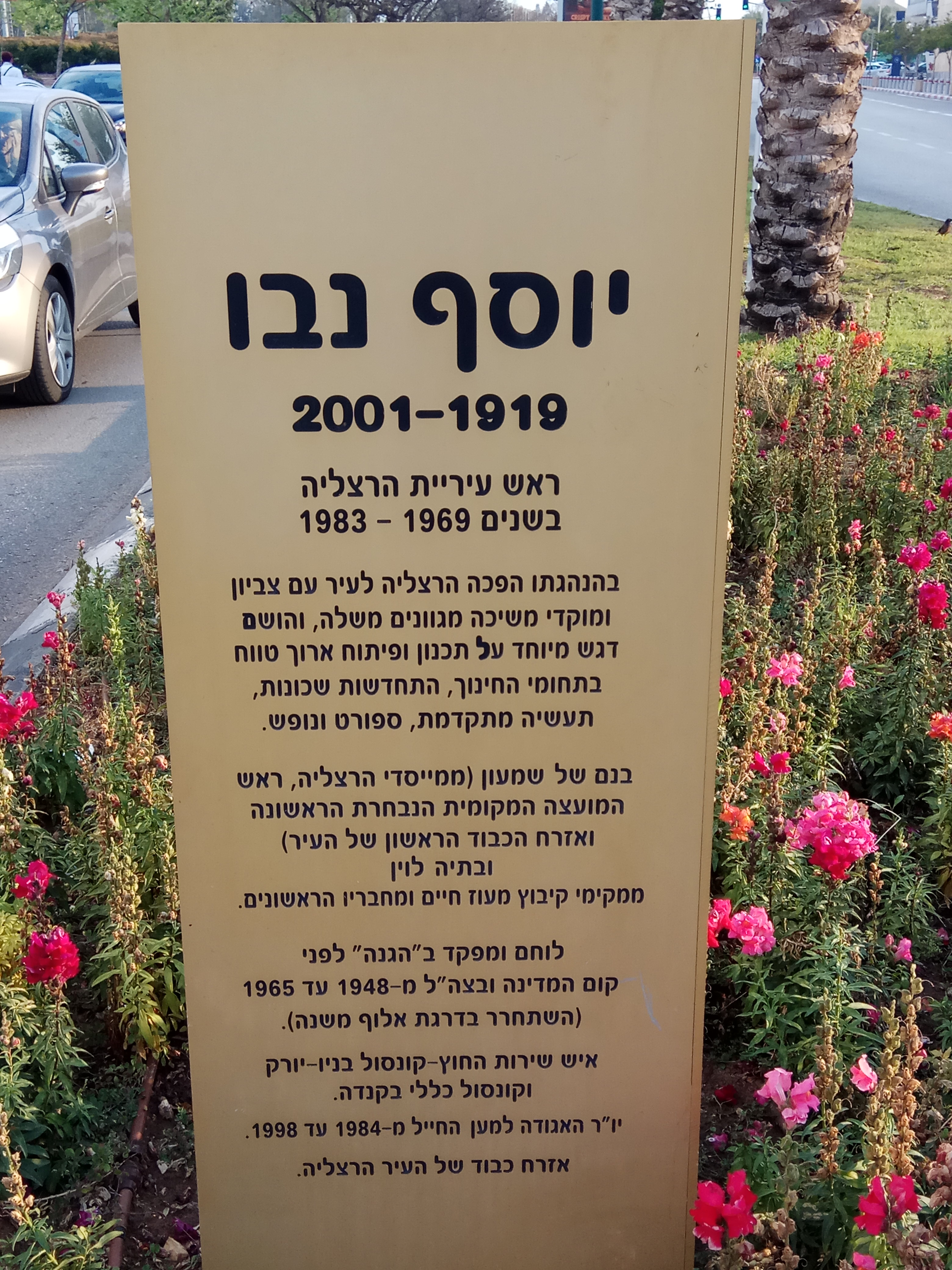 שלט הנצחה ליוסף נבו ברחוב יוסף נבו בהרצליה